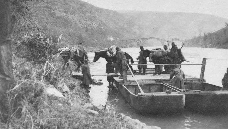 Aleatet Austro-Hungarez Ne Has